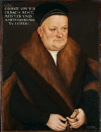 Portret Georga of Wiedebach | 1524-1526 | 39.5 x 30 cm | Museum der bildenden Künste, Leipzig